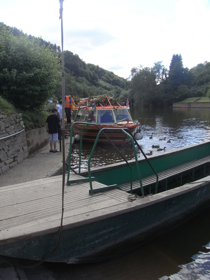 Symonds Yat Fähre